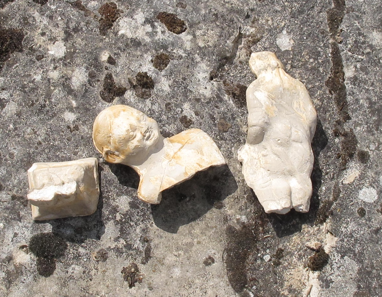 ex-votos, Aquis Segeste, Sceaux-du-Gatinais